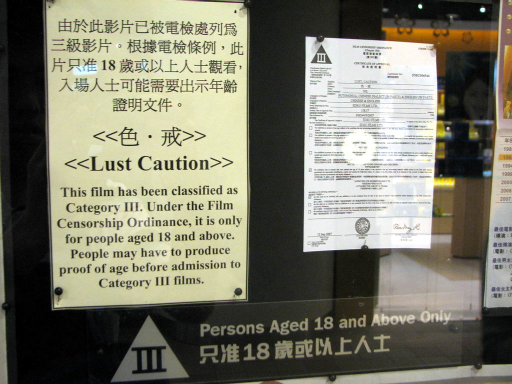 中文（香港）: 香港戲院展示第Ⅲ級影片的告示，及《電影檢查條例核准證明書》副本。